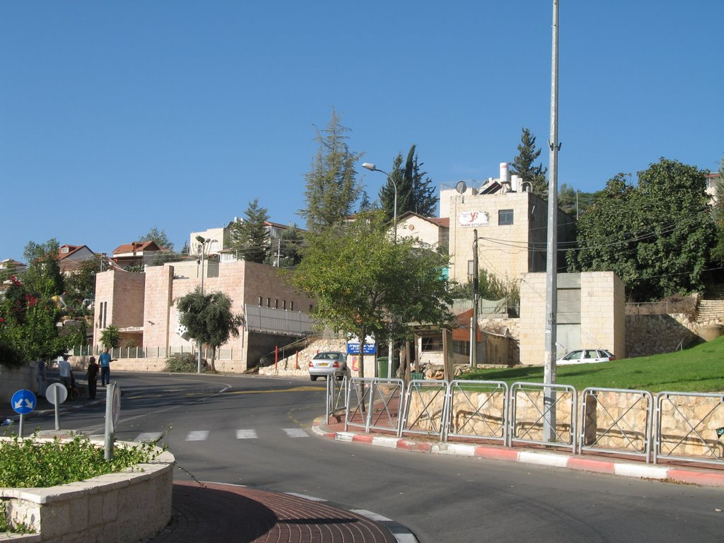 מבשרת ציון